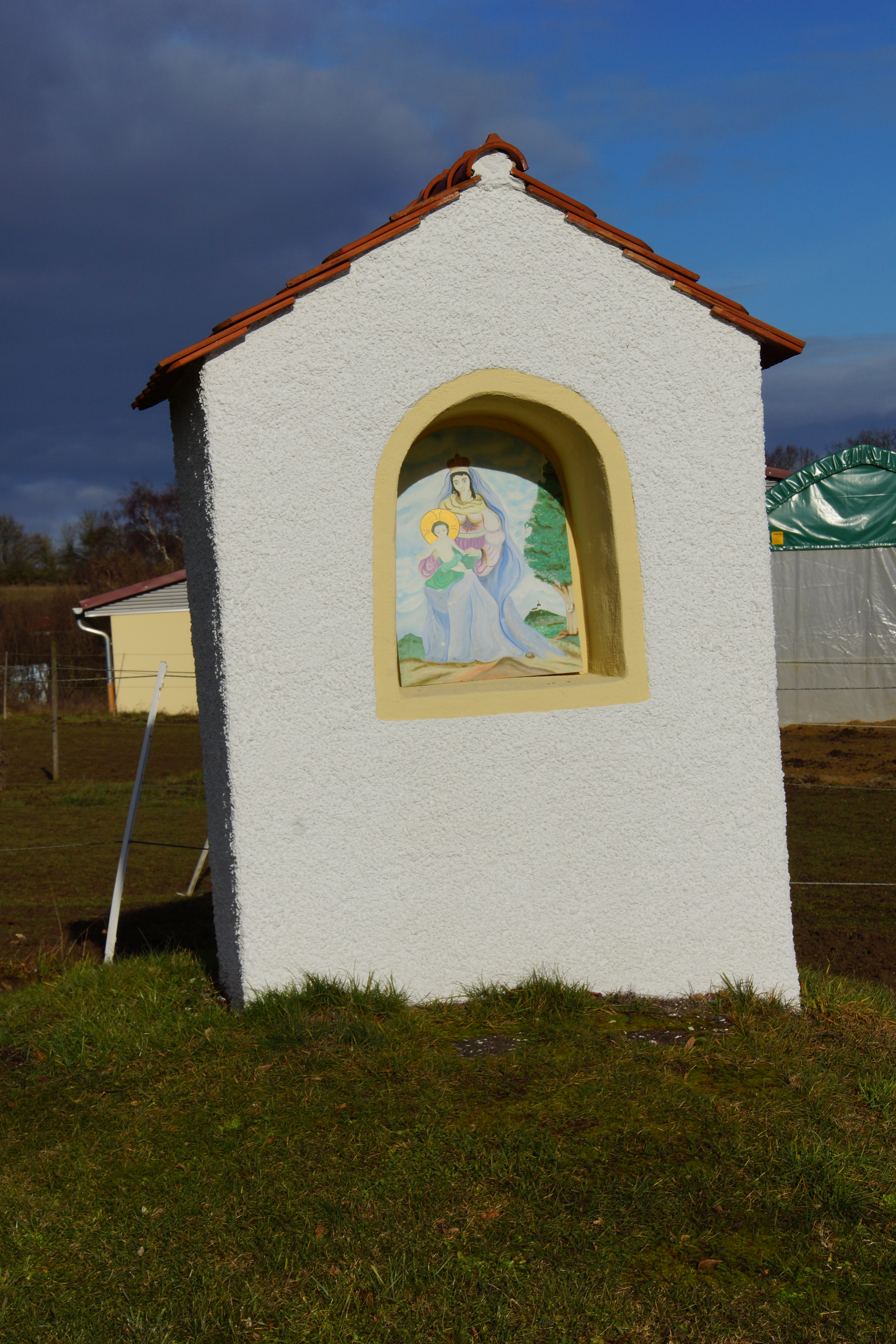 Der Ort Unterwiesenacker gehört zur Stadt Velburg in der Oberpfalz